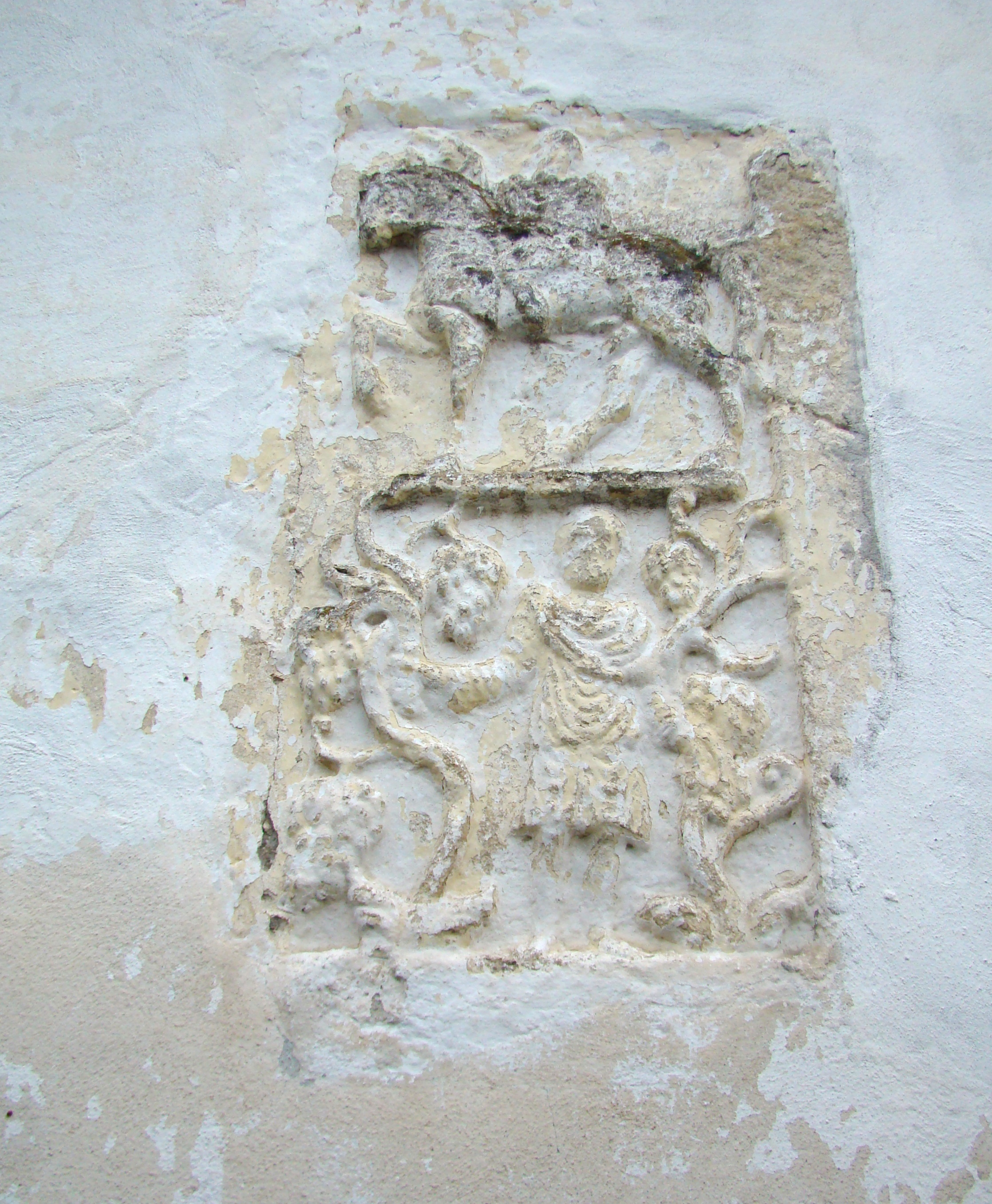 Biserica reformată, sat aparținător Sâncrai; municipiul Aiud, județul Alba 01